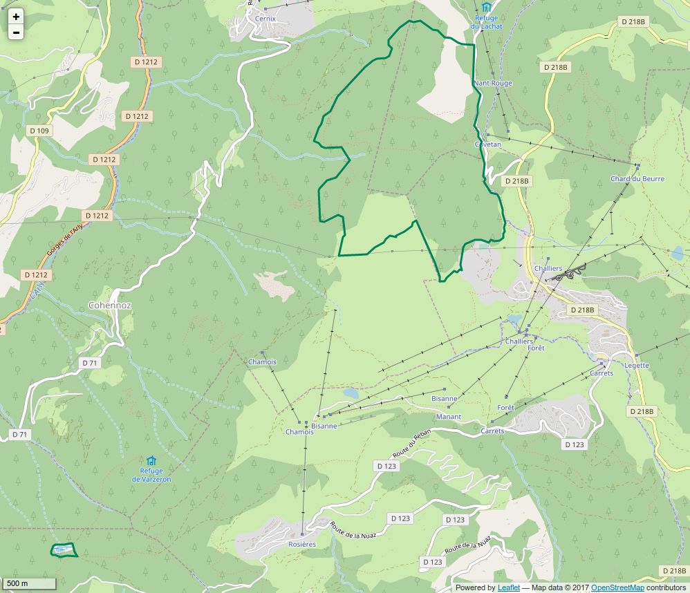 Périmètre de la RNR de la Tourbière des Saisies - Beaufortin - Val d'Arly.